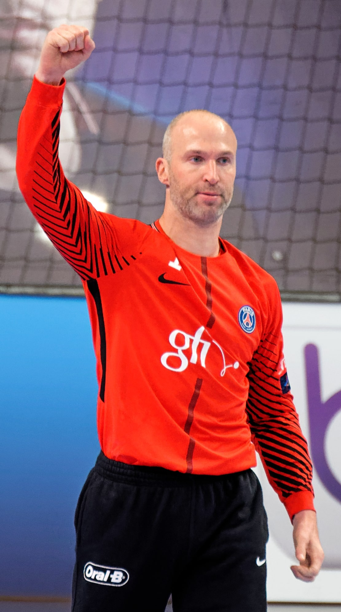 Match entre le PSG Handball et Veszprem. A Coubertin, le 12 novembre 2017.